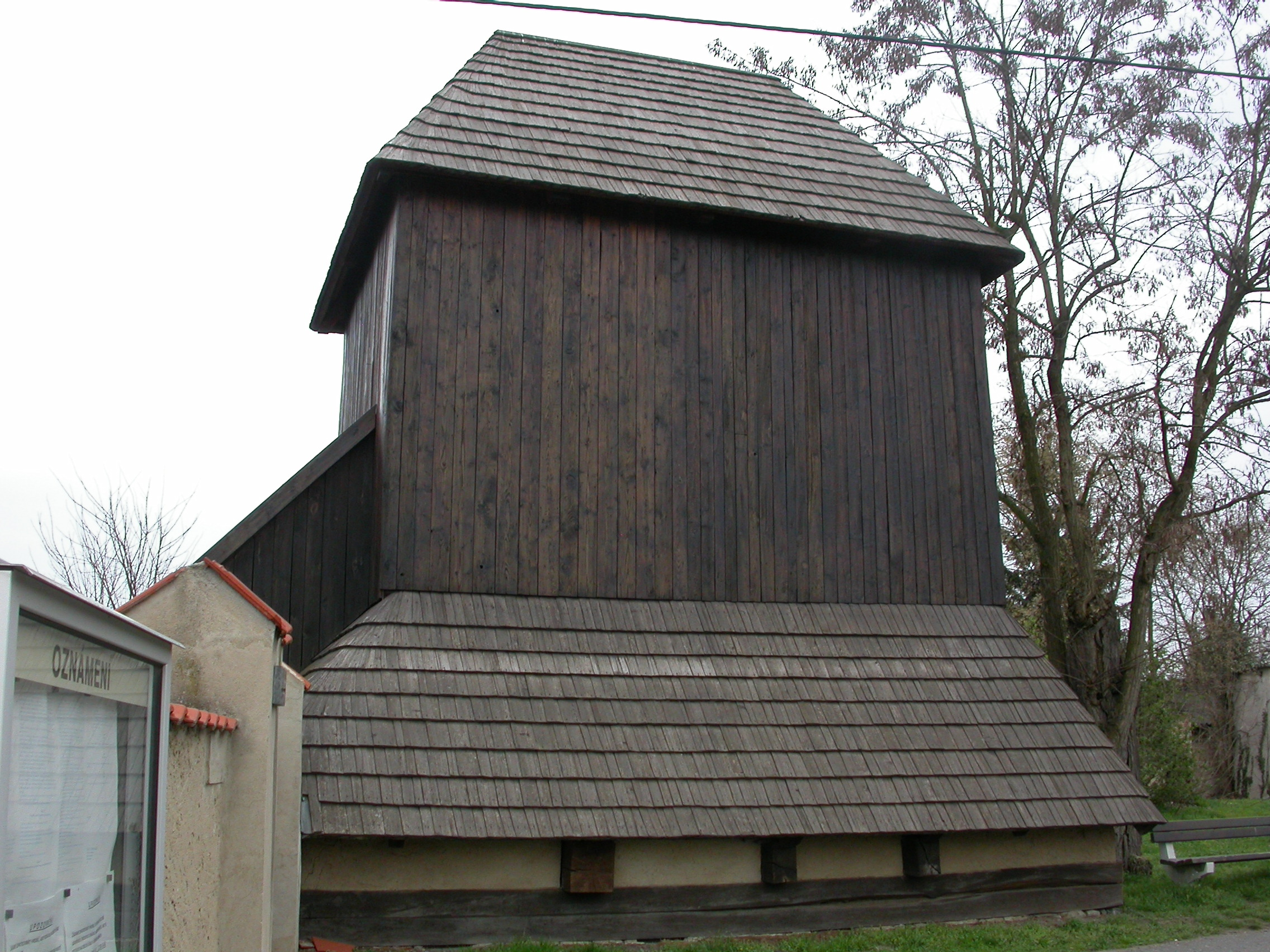 Západní pohled na Dřevěnou zvonici, při kostelu sv. Jakuba v Libiši.